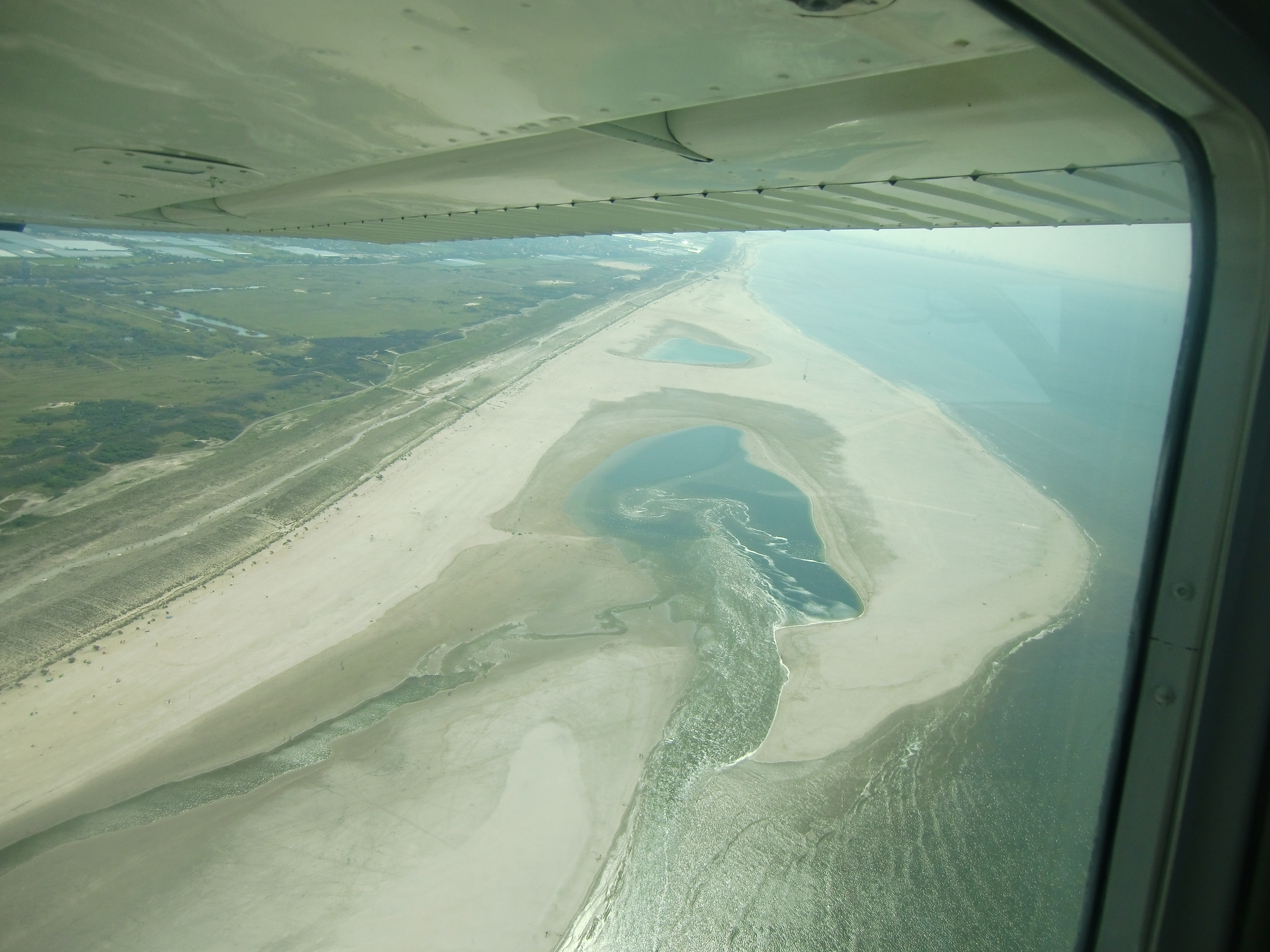 Zandmotor vanuit de lucht